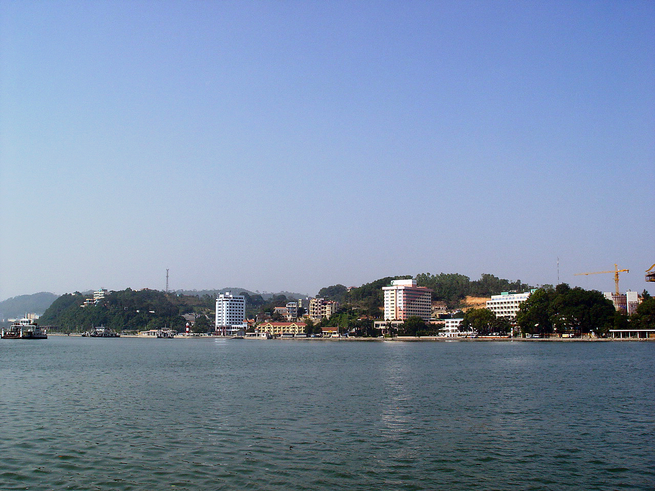 Bãi Cháy 2005